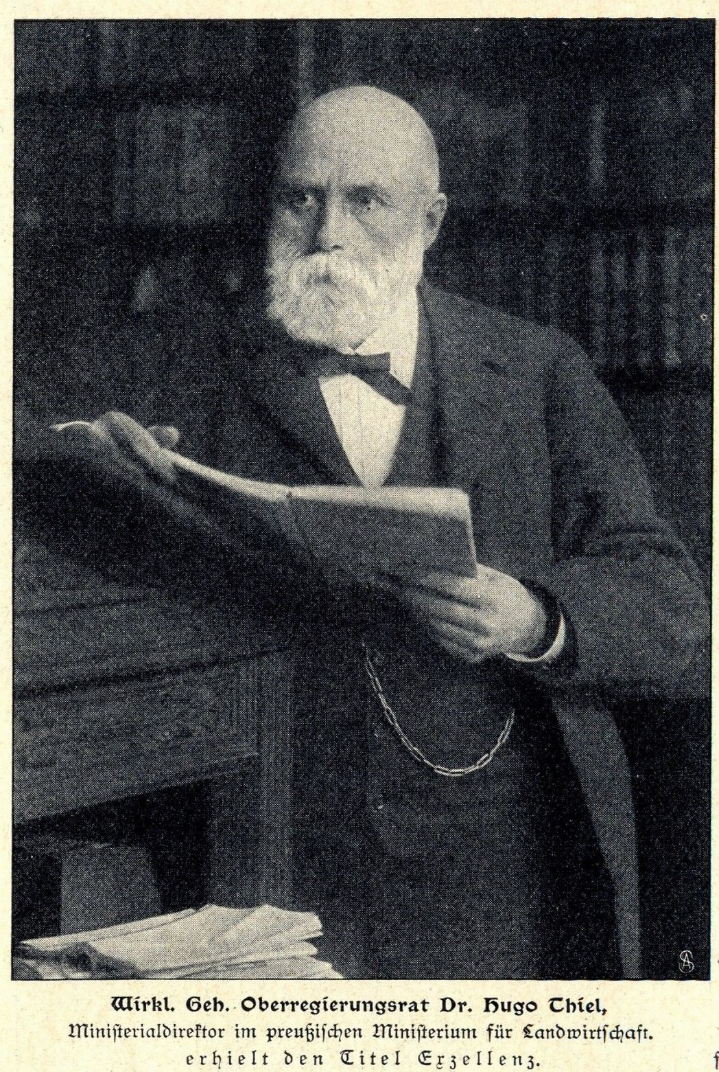 Dr. Hugo Thiel erhielt den Titel Exzellenz, 1907